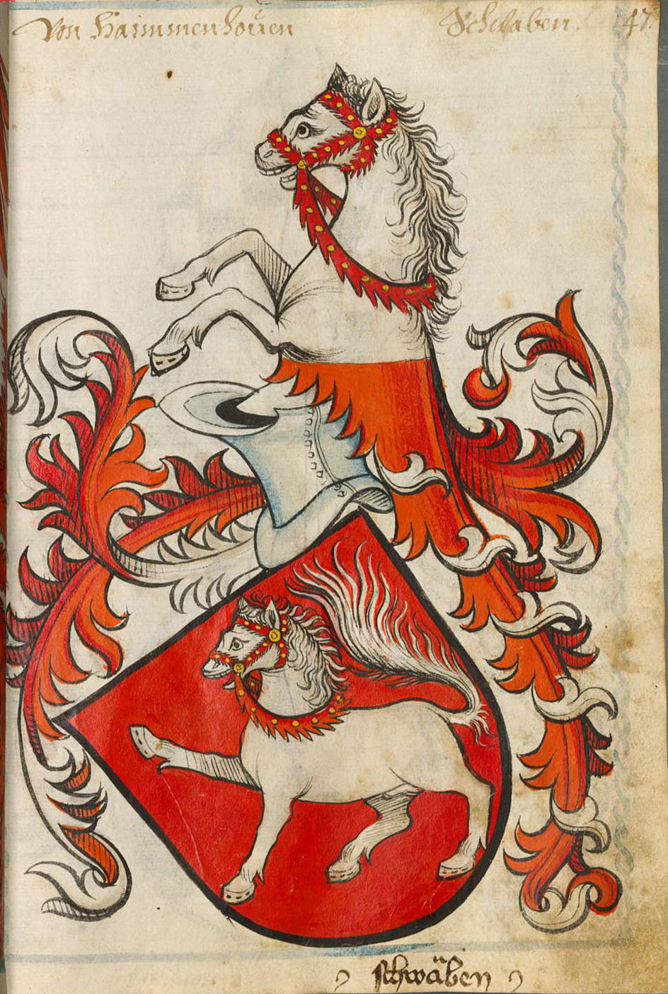 Scheibler'sches Wappenbuch, älterer Teil